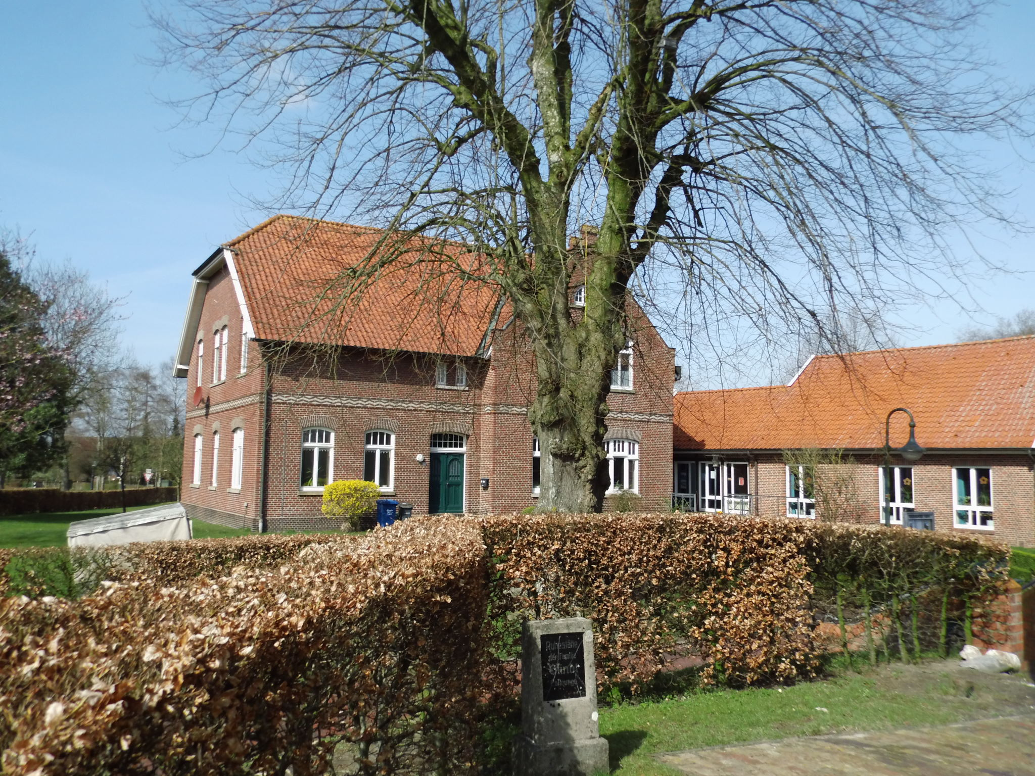 Ehemaliges Pfarrhaus der evangelisch-lutherischen Kirchengemeinde Ardorf, Ardorf, Stadtteil der Stadt Wittmund, Landkreis Wittmund, Niedersachsen, Deutschland